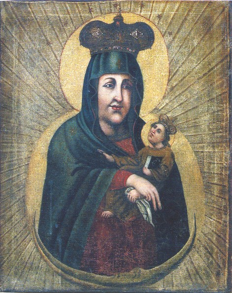 Богоматерь Снежная. XVIII в. Дер. Субаты (Дрогичинский р-н Брестской обл.)